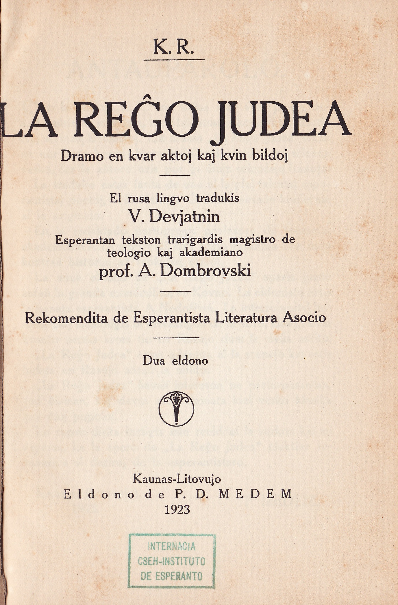 La Reĝo Judea